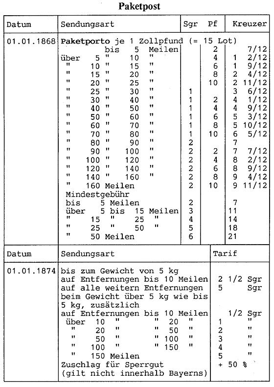 Das Paketporto zur Zeit des Norddeutschen Bundes